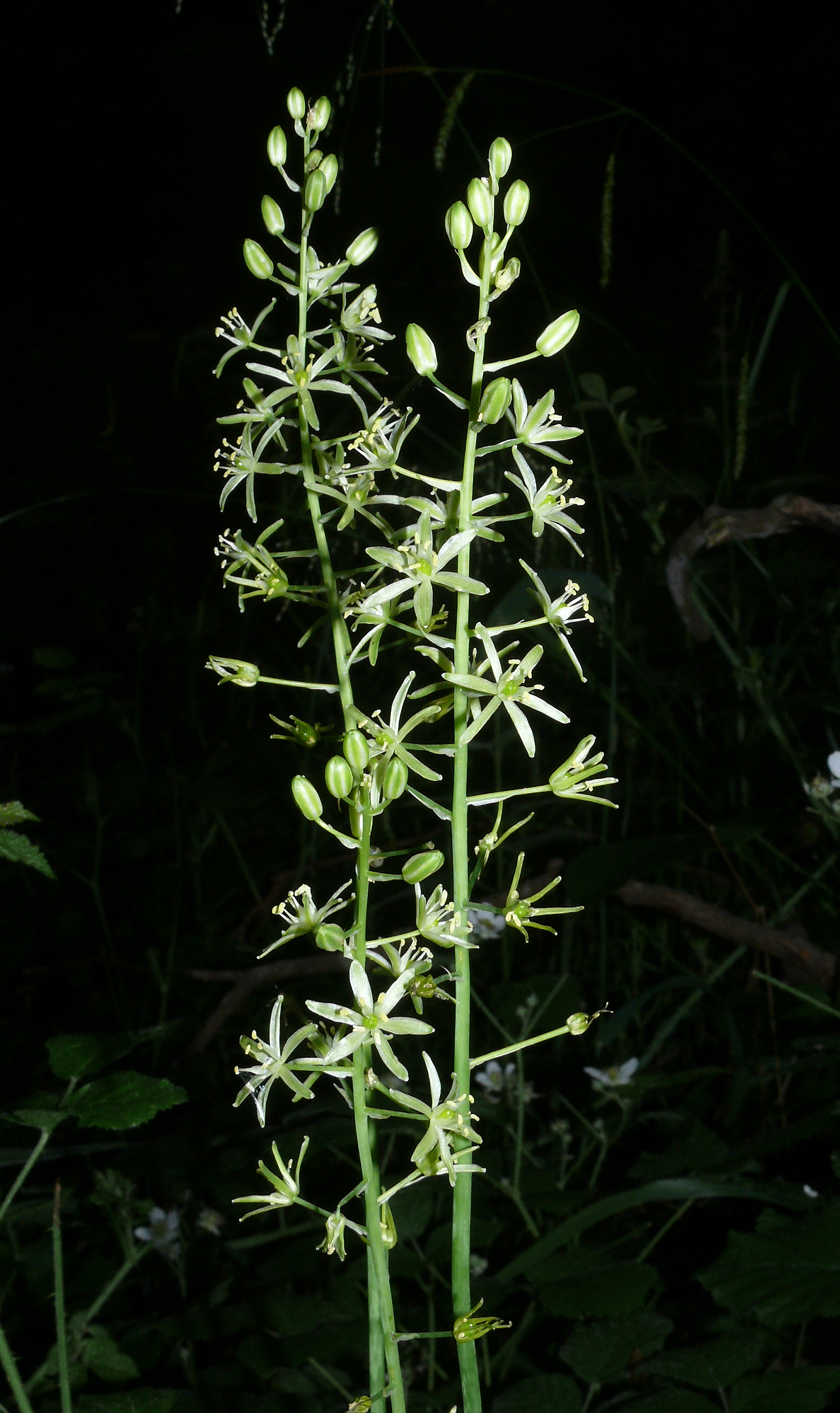 Ornithogalum pyrenaicum, Hohenlohe, Deutschland